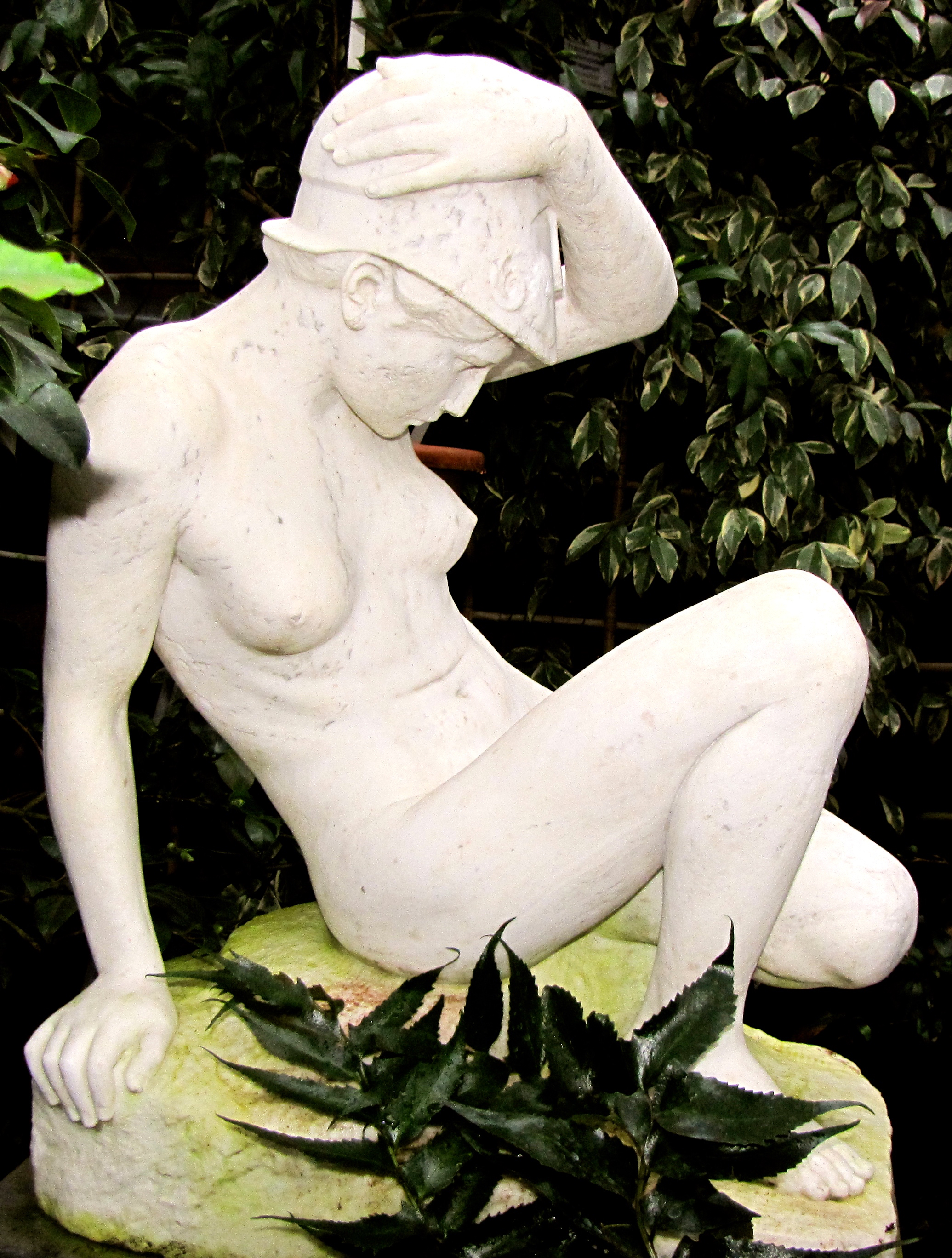 Flora (Köln): Nikolaus Friedrich - Sterbende Amazone, Marmor, um 1910. Erworben um 1957 für den Frauenrosenhof, seit 2010 im Subtropenhaus